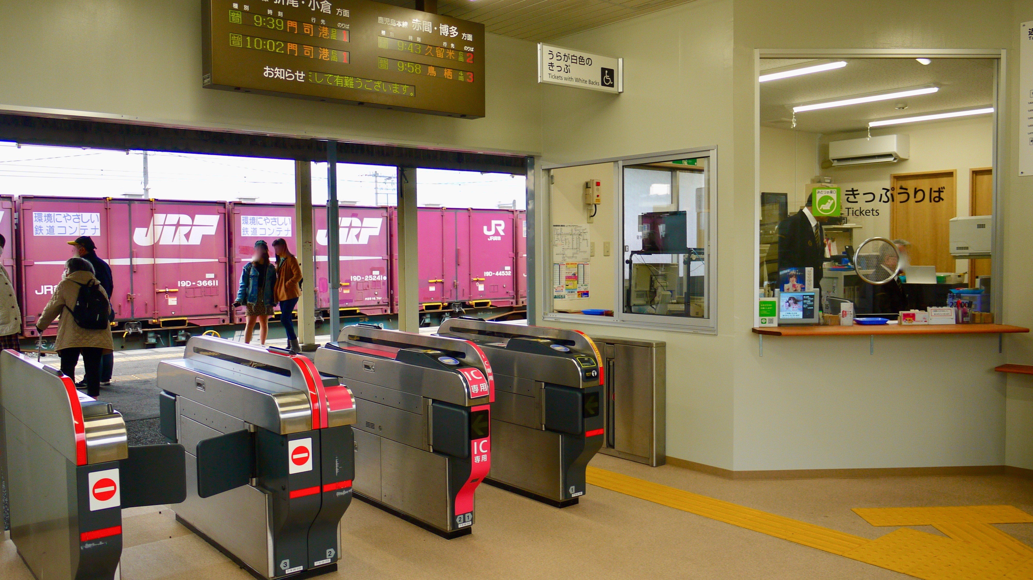 全焼後に作られた、新たな遠賀川駅の構内の写真。 構内には、みどりの窓口やICカード専用改札機などがある。